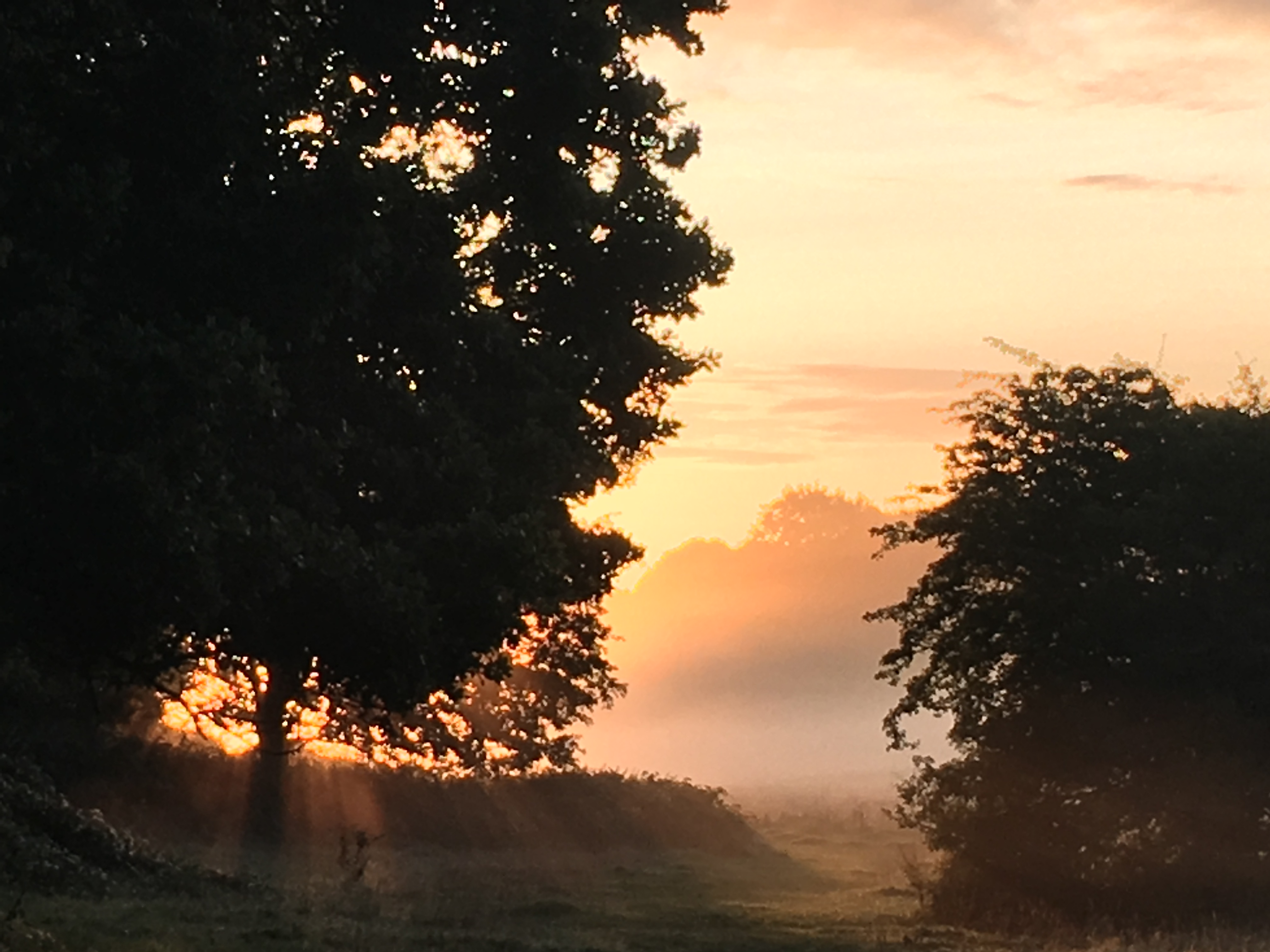 Park Sunrise